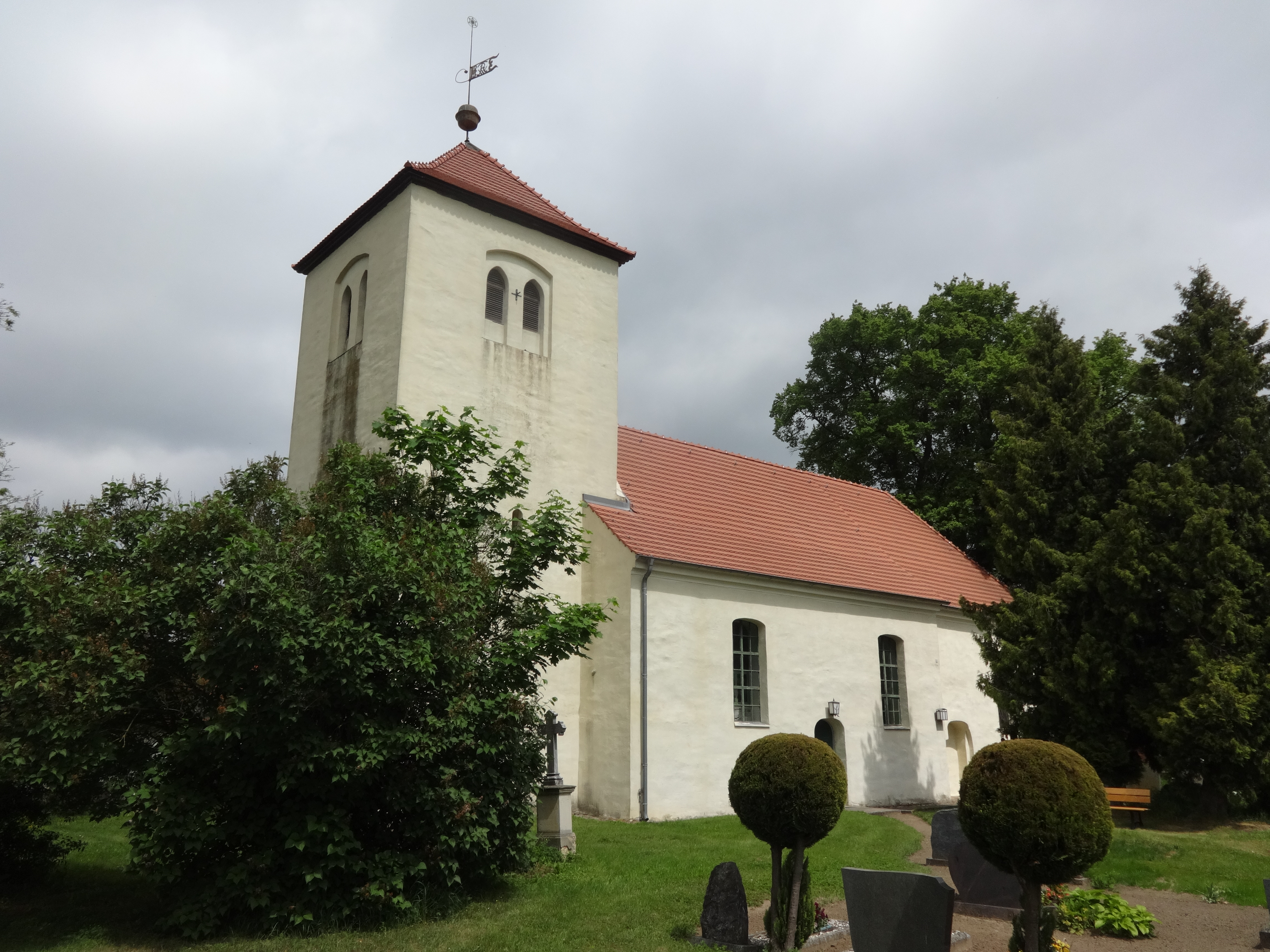 Die Saalkirche in Libbenichen entstand im Jahr 1736 auf den Resten eines mittelalterlichen Vorgängerbaus. Bei Instandsetzungsarbeiten nach dem Zweiten Weltkrieg legten Handwerker die Reste eine mittelalterlichen Ausmalung frei. Der Kanzelkorb stammt aus der ersten Hälfte des 19. Jahrhunderts.